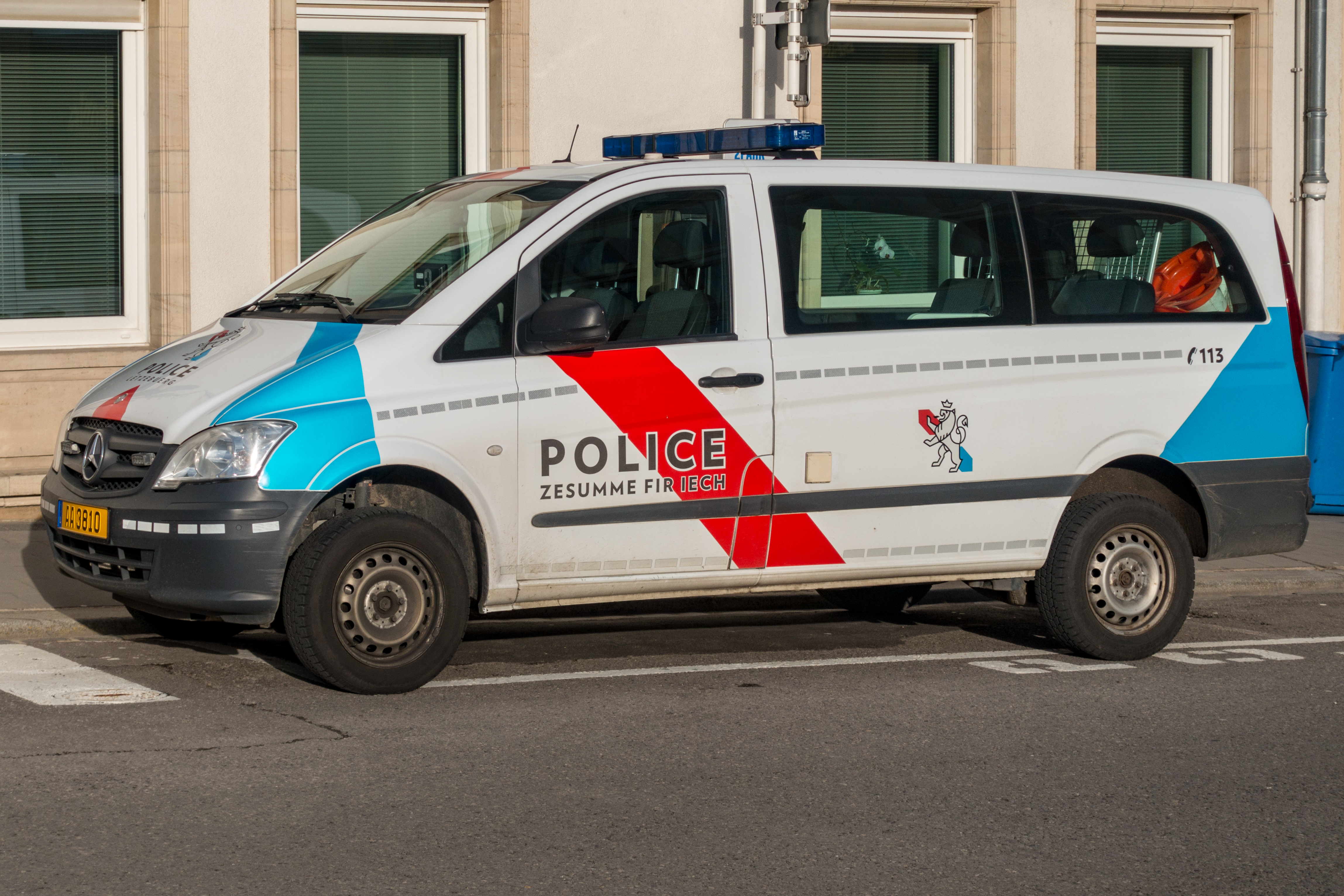 E Policewon beim Kommissariat vun der Police Um Gruef.